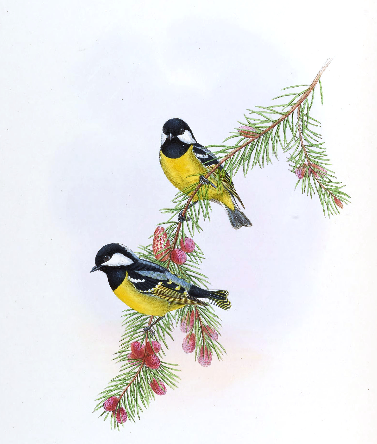 Parus venustulus